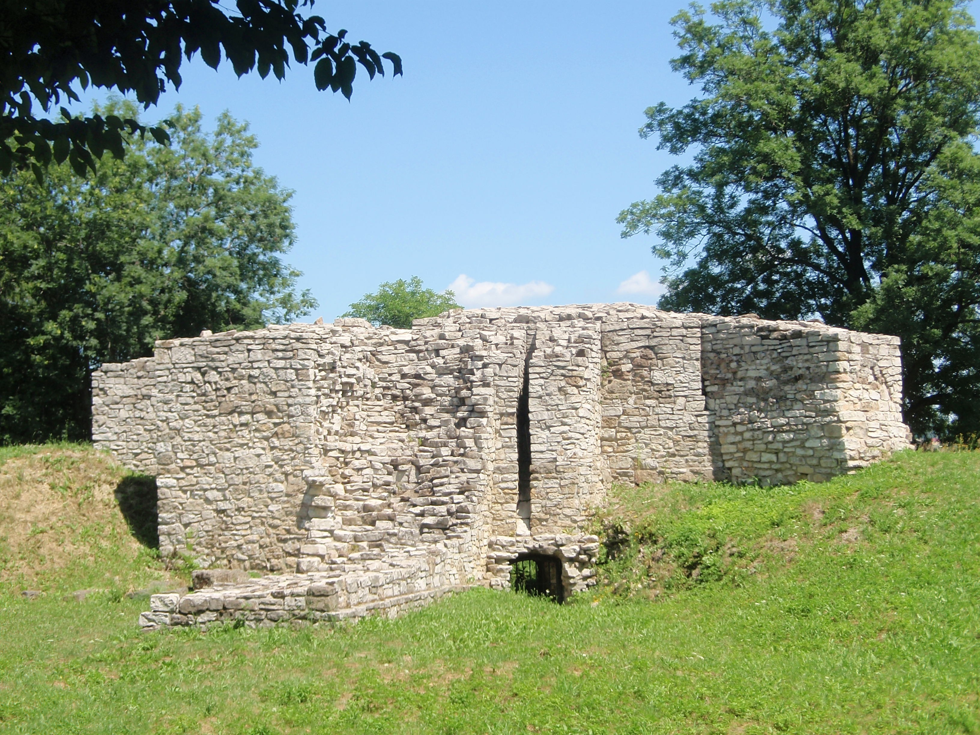 Ruiny zamku w Sławkowie (woj. śląskie)